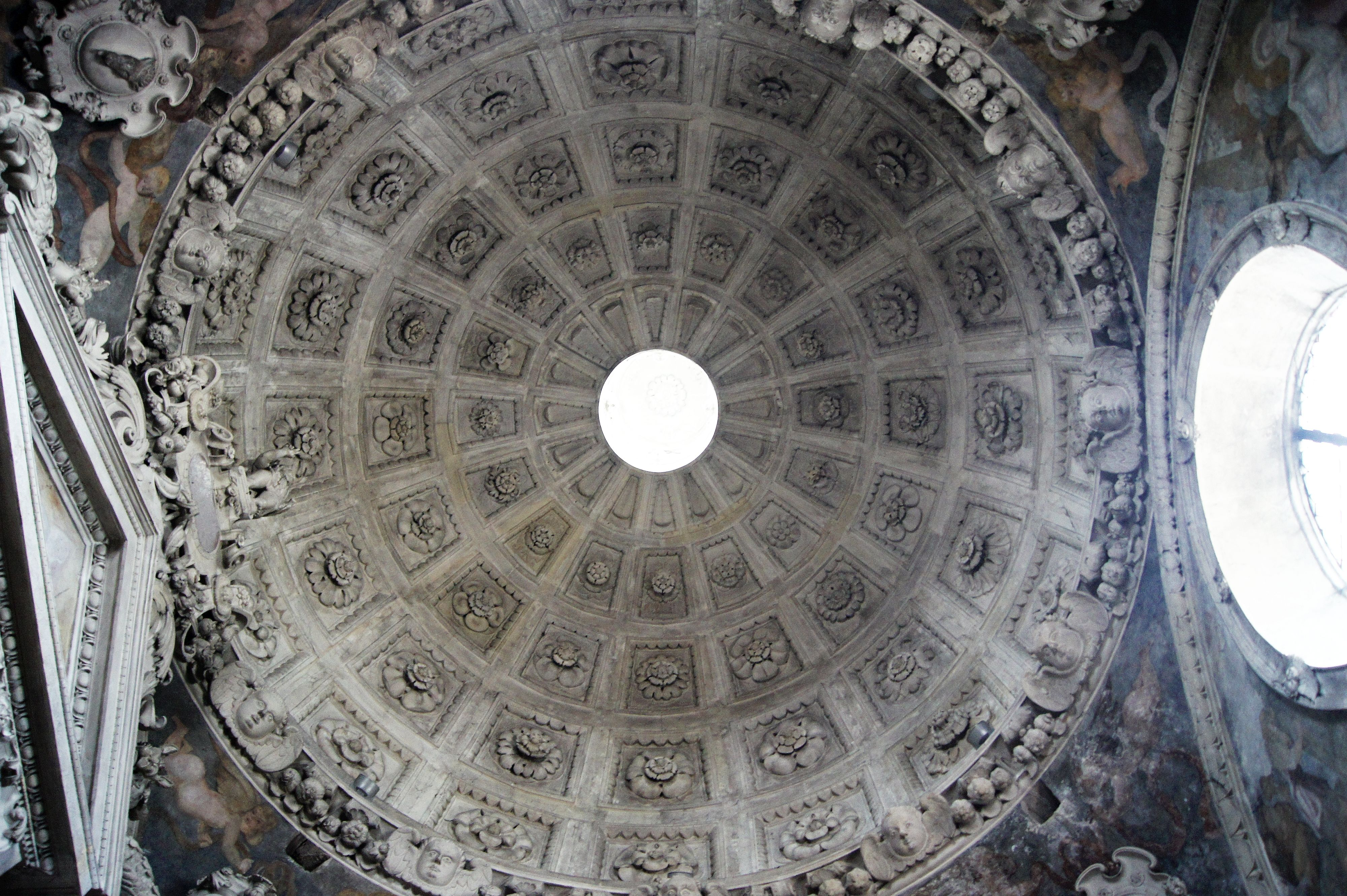 Nagrobek Firlejów w Bejscach